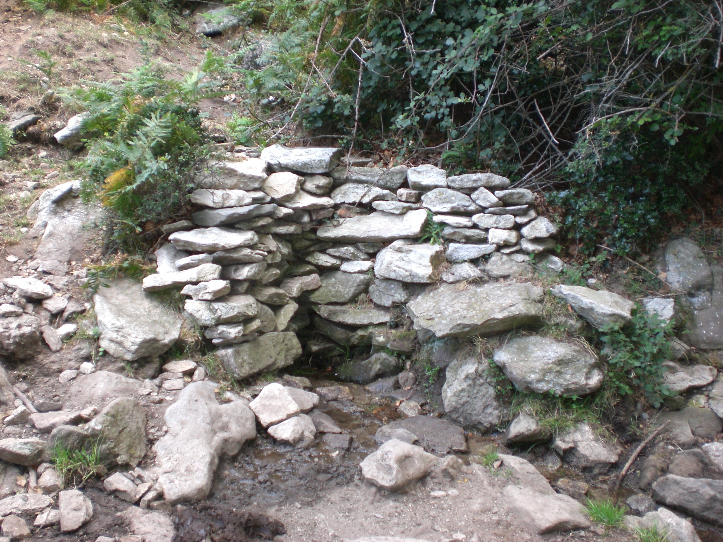 Font de la Maçana, situada al vessant nord del coll del mateix nom al terme municipal d'Argelers.